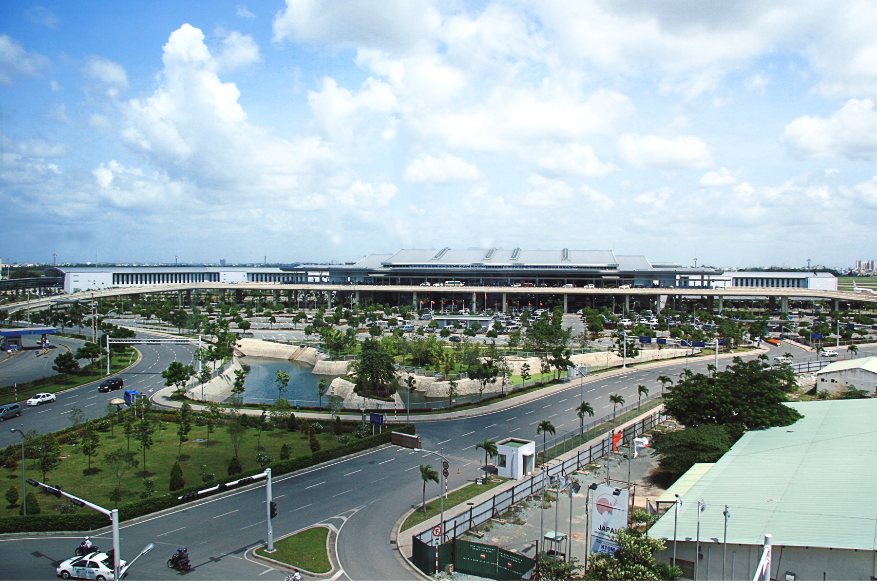 Tân Sơn Nhất International Airport, Ho Chi Minh City, Vietnam